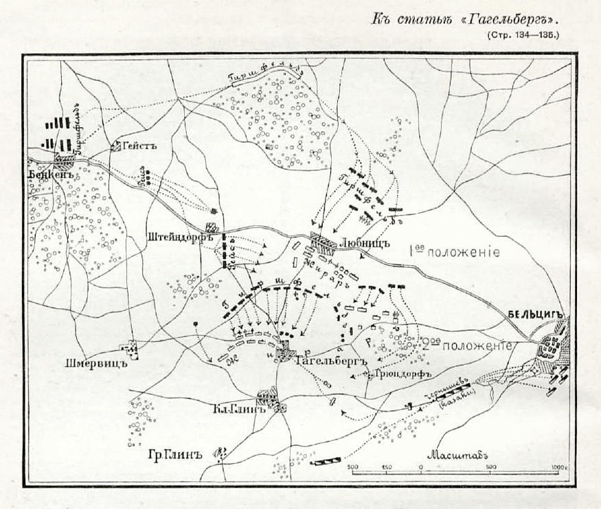 Данное фото было использовано в статье «Гагельберг» опубликованной в седьмом томе «Военной энциклопедии», который был издан книгоиздательским товариществом И. Д. Сытина в 1912 году в столице Российской империи городе Санкт-Петербурге.